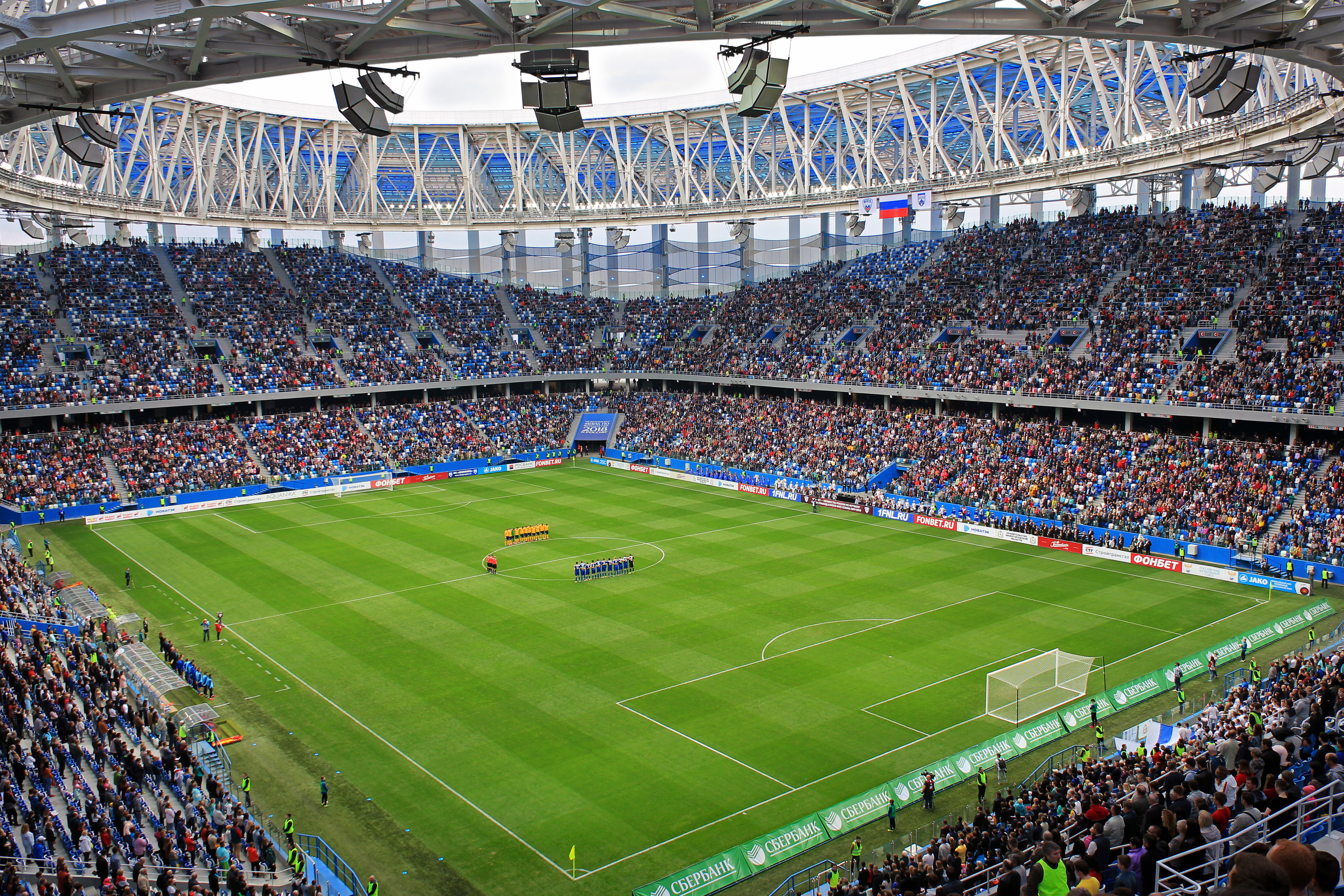 Стадион "Нижний Новгород". Матч 6 мая 2018 г. — ФК «Олимпиец» (Нижний Новгород) — ФК «Луч Энергия» (Владивосток)